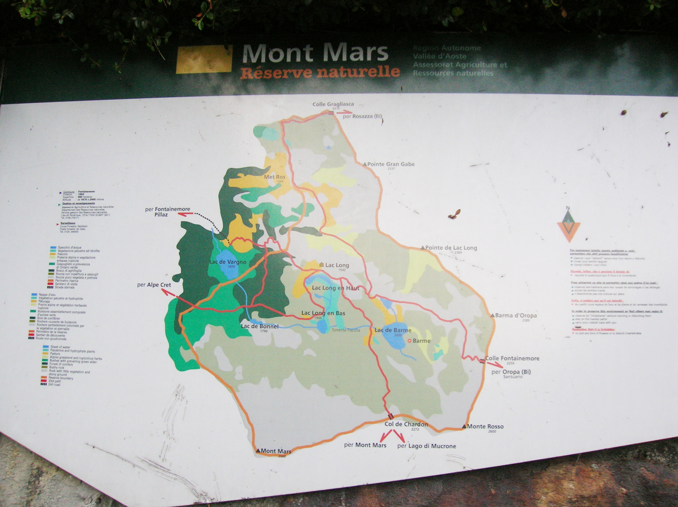 Pannello informativo con la mappa della Riserva naturale Mont Mars, a Fontainemore, Valle d'Aosta, Italia.